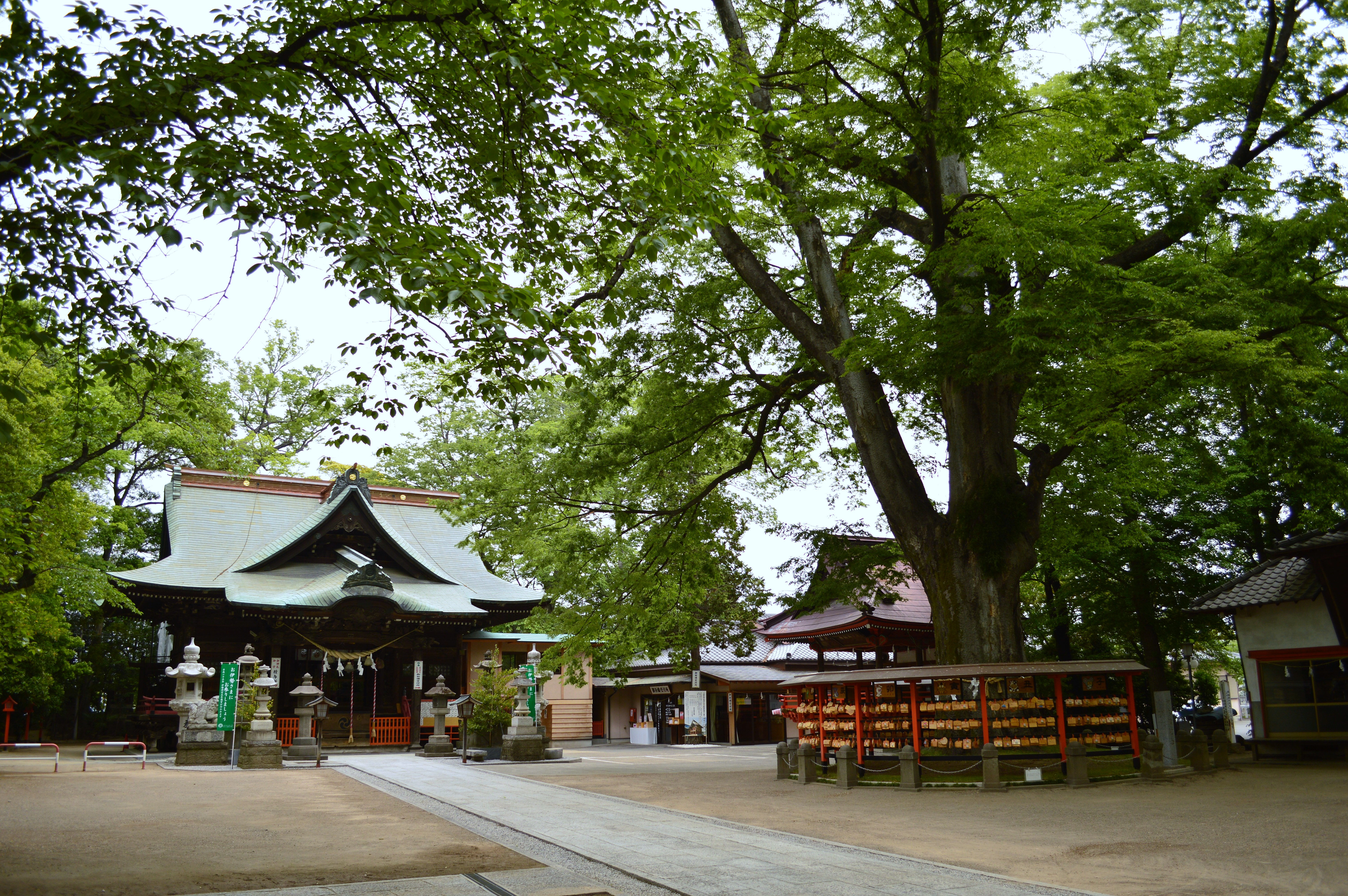 総社神社 (前橋市) 境内